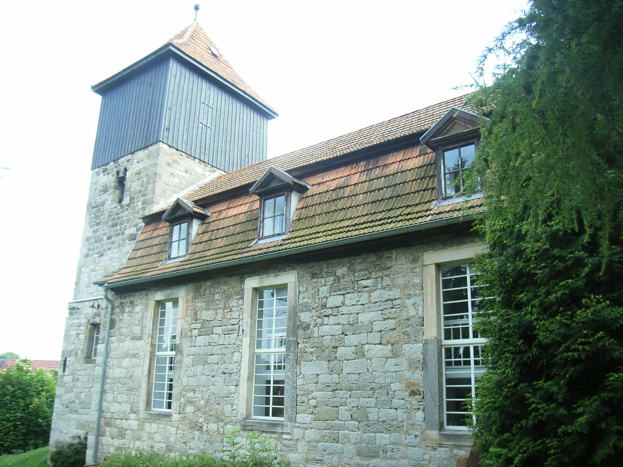 Kirche von Angelhausen, Ortsteil von Arnstadt in Thüringen